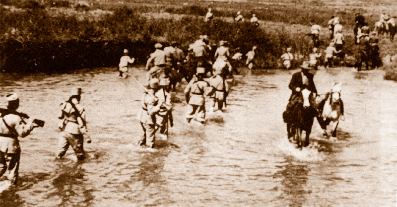 סיור מאובטח היטב לפני העלייה למצודות אוסישקין 1939 ארכיון ההגנה